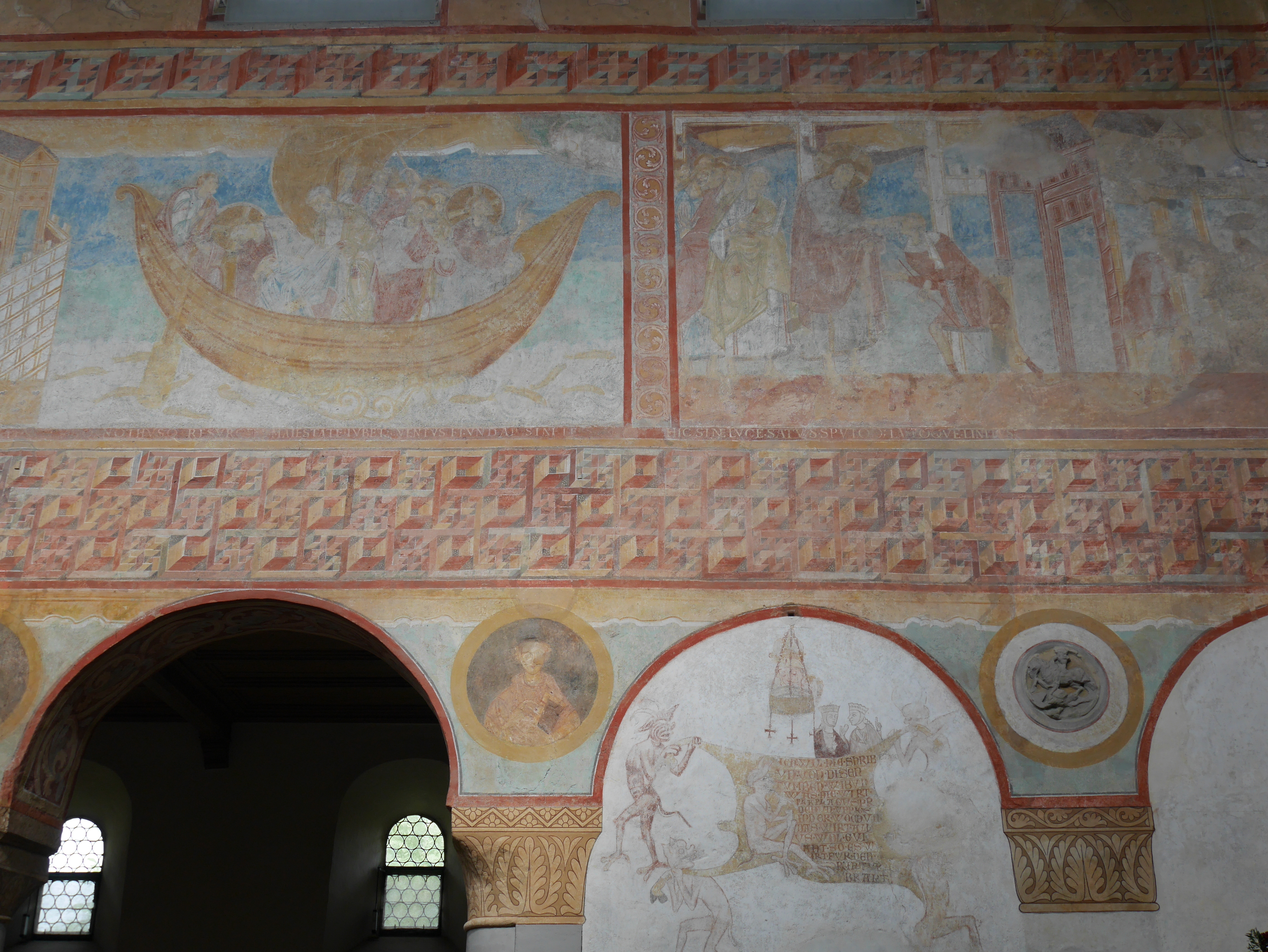 Interior of St. George (Reichenau) Langhaus Fresken Spottvers